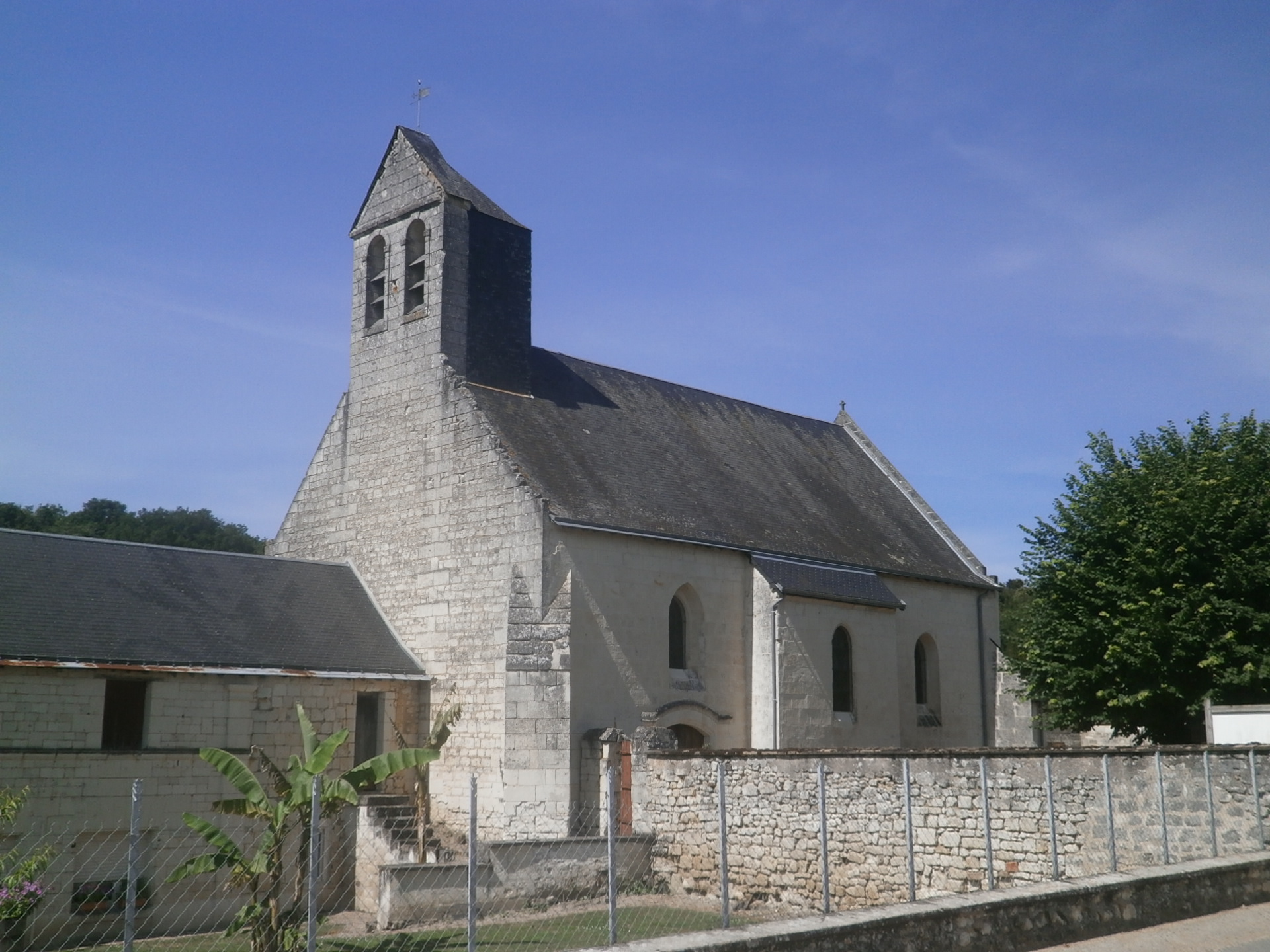 L'église de Couziers.